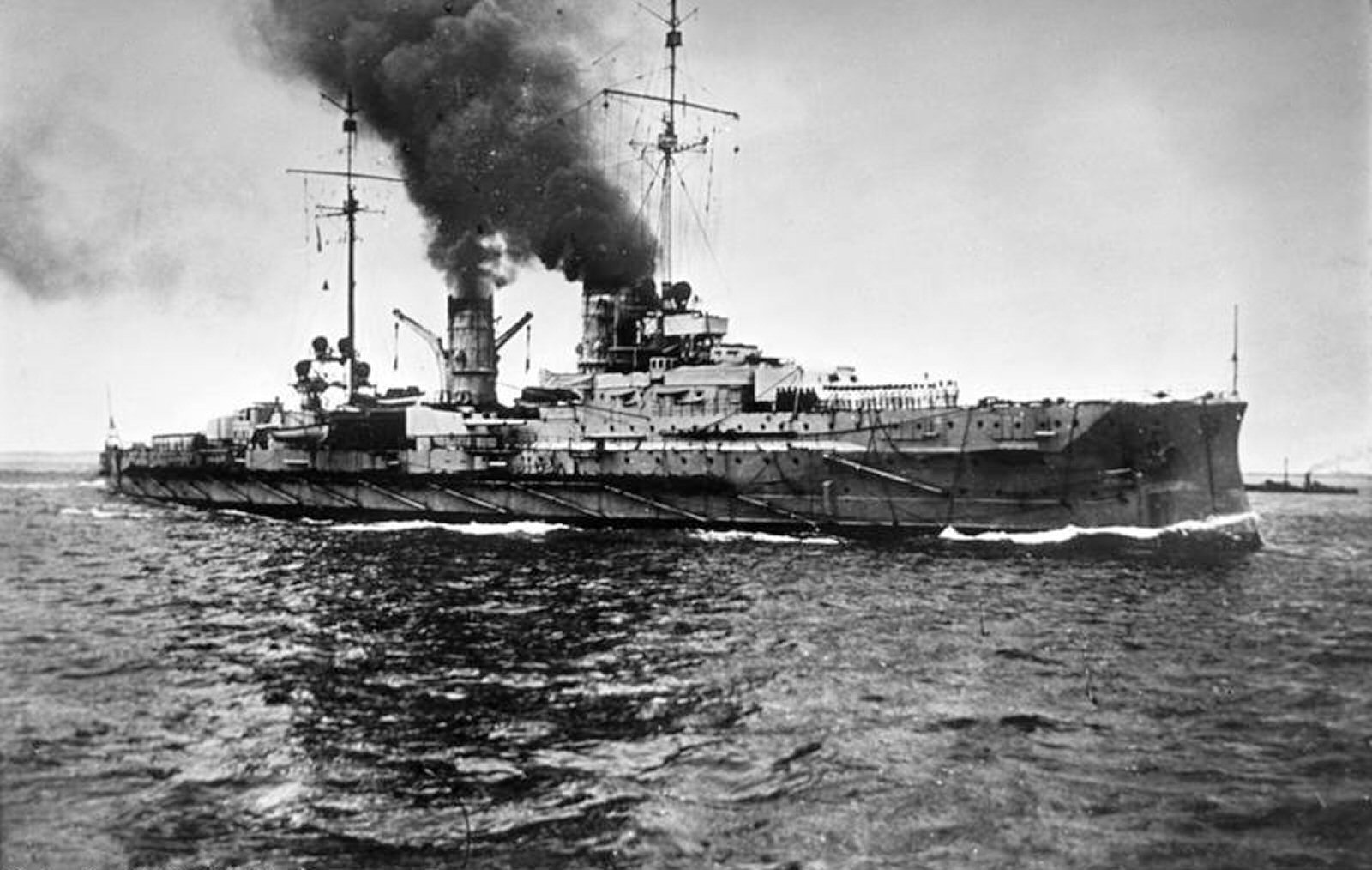 Kreuzer "SMS Blücher" Kreuzer "S.M.S. Blücher", Ansicht der Steuerbord-Seite